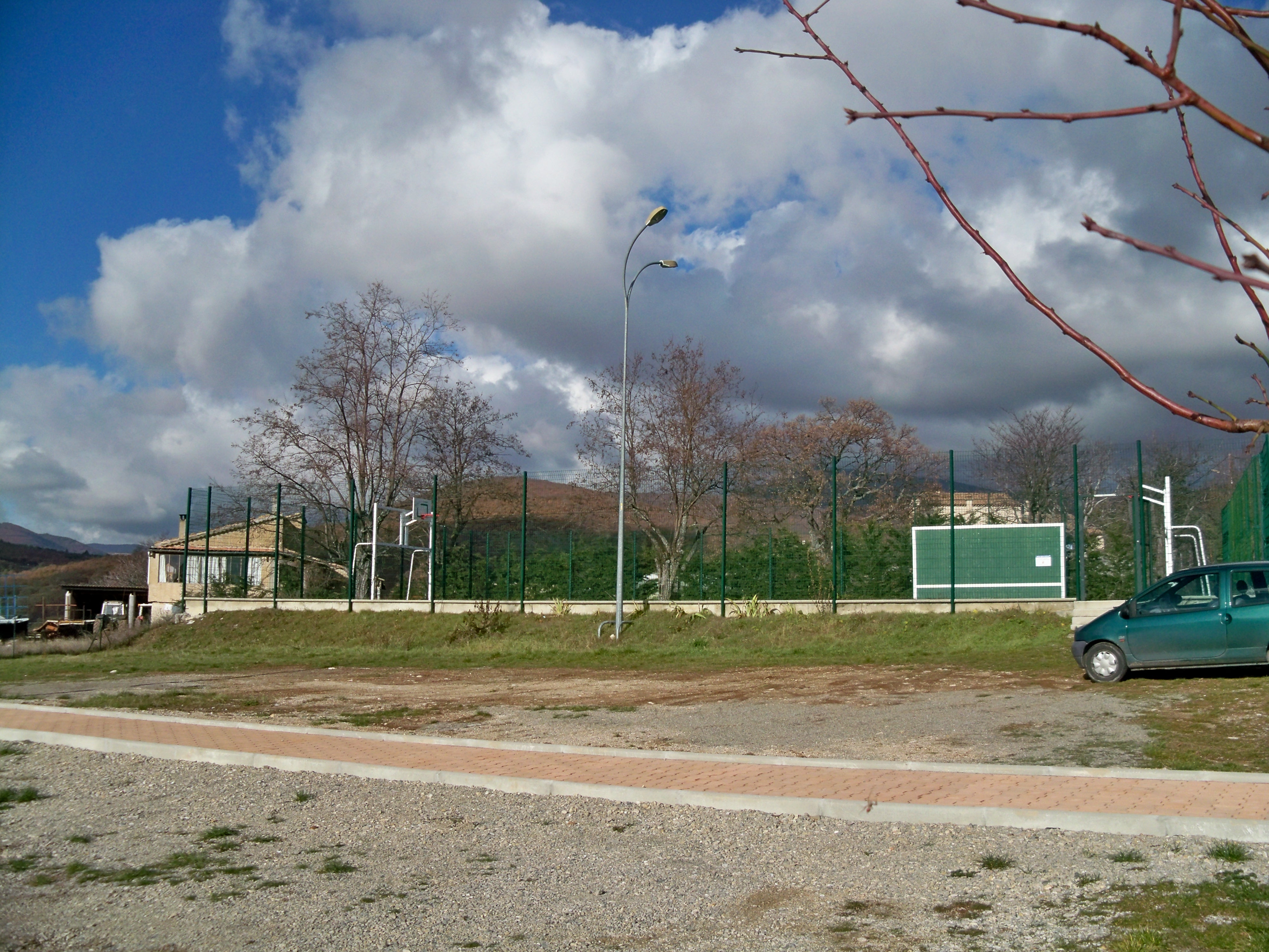 terrain de Basketball à Lardiers, Alpes de Haute Provence